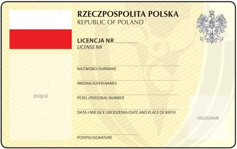 Awers patentu motorowodnego na holowanie.